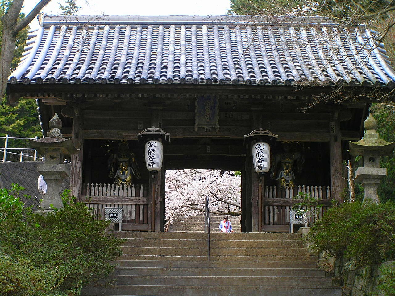 8番_熊谷寺